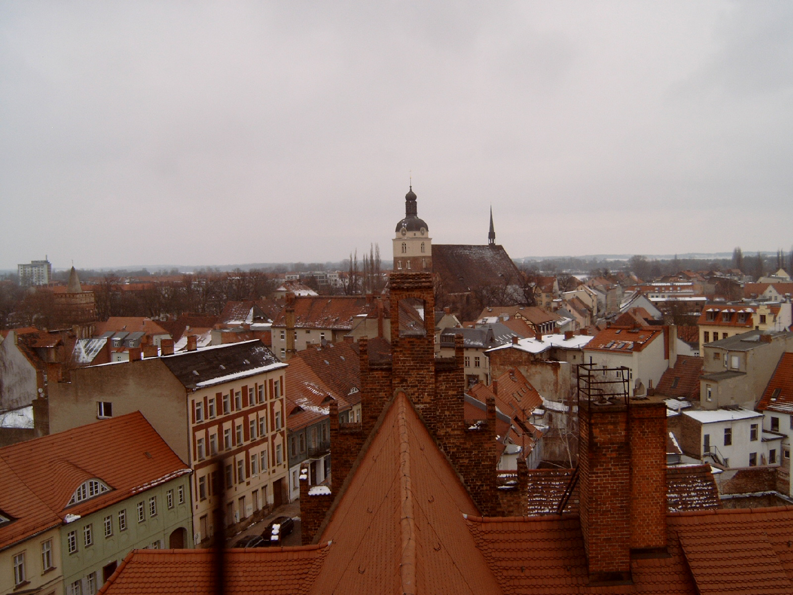 St. Gotthardt vom Altstädtischen Rathause her